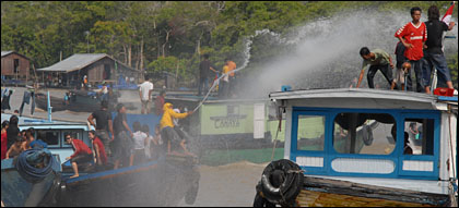 Belimbur, salah satu prosesi dari Erau